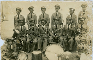 Banda de Música Imaculada Conceição, sob a regência do Maestro Apolonio Torreão, 1935